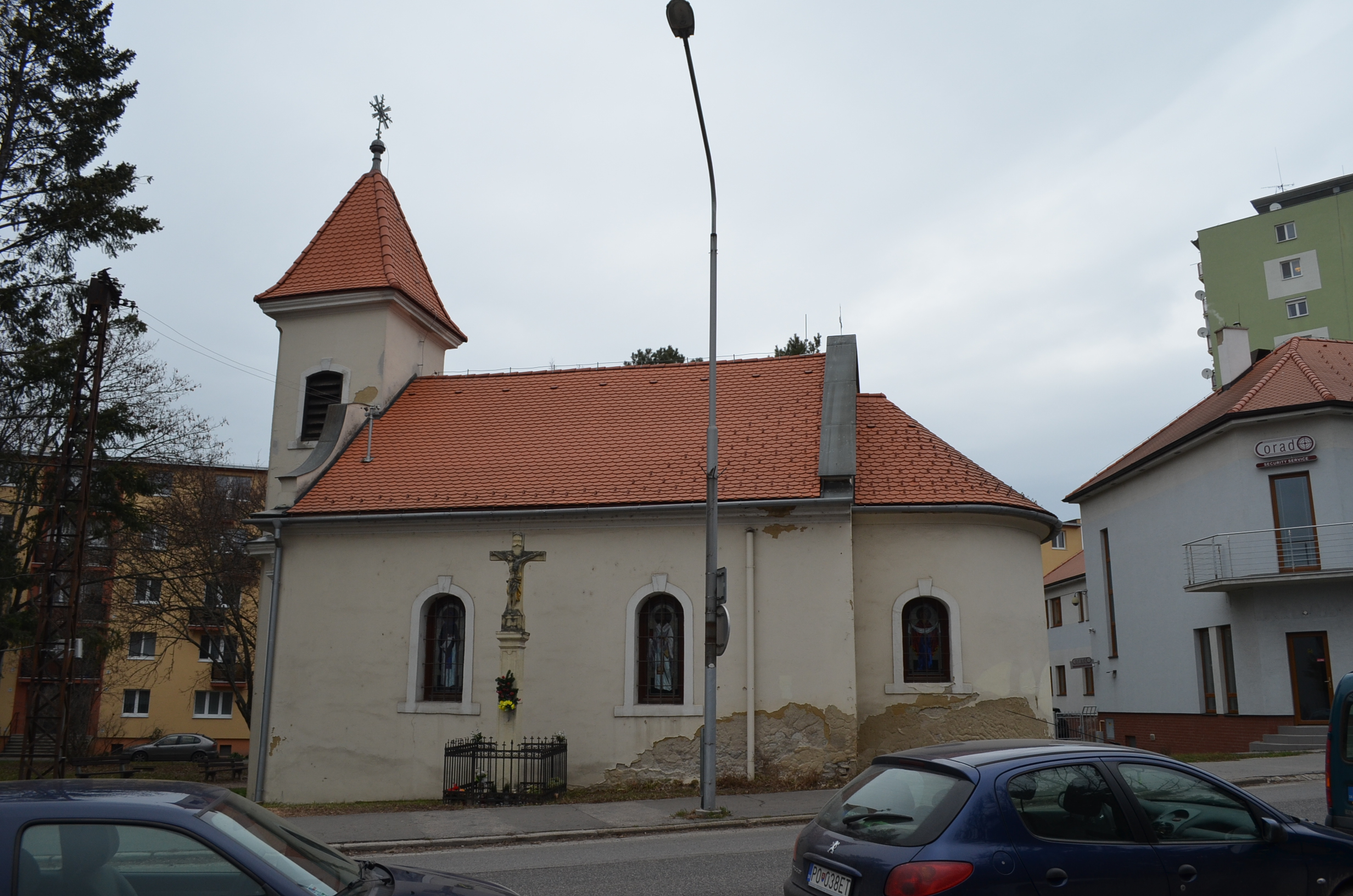 Kereszt a Szent István templomnál